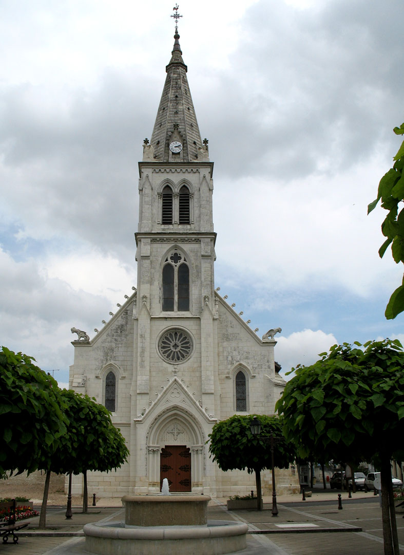 Église de Ligueil, Indre-et-Loire, France